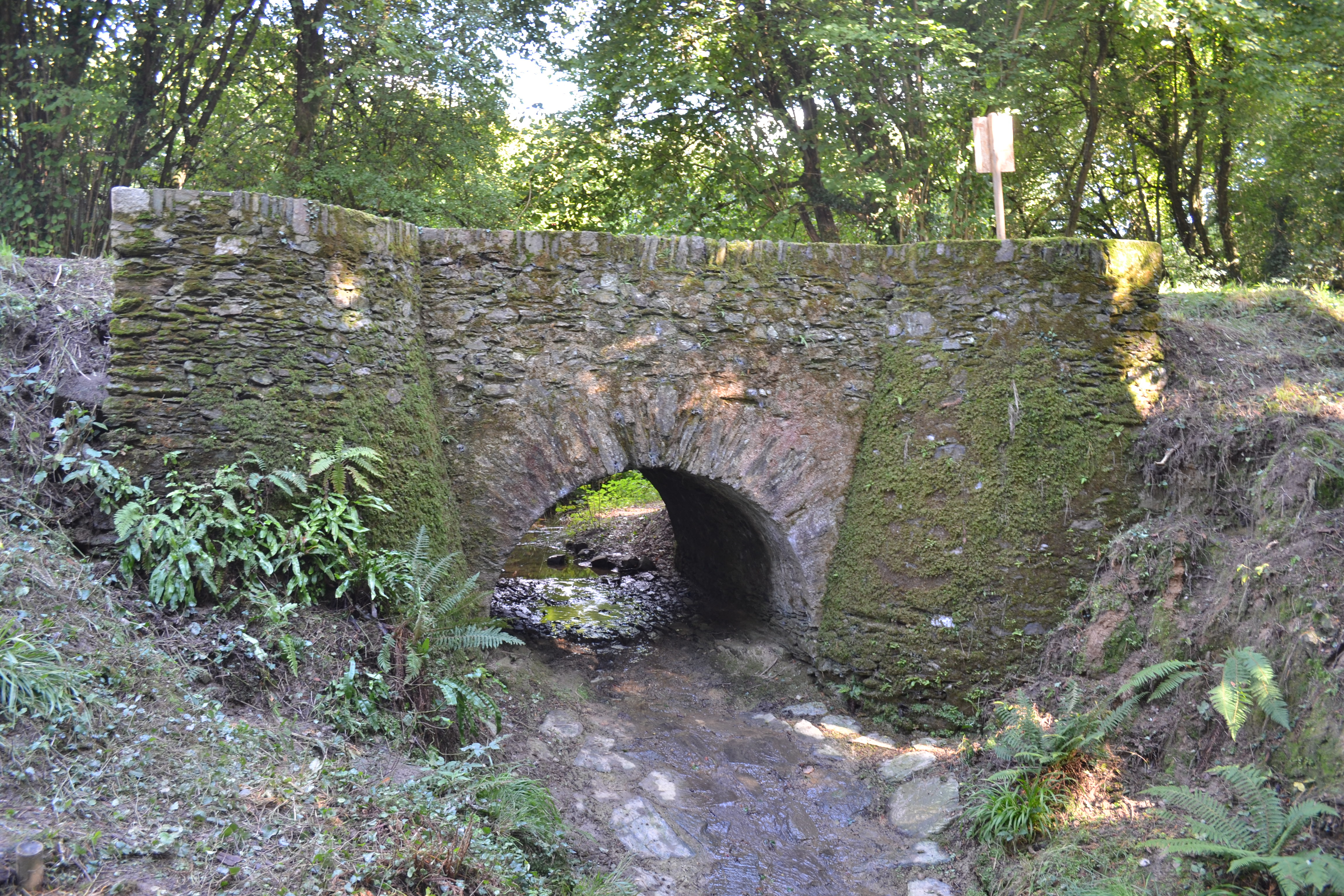 Pont des Hommes sans Tête, Oudon, Loire-Atlantique